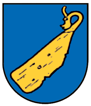 Coat of arms Alfstedt, Wappen der Gemeinde Alfstedt